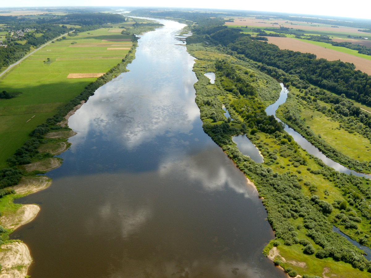 Nemunas netoli Graužėnų km.